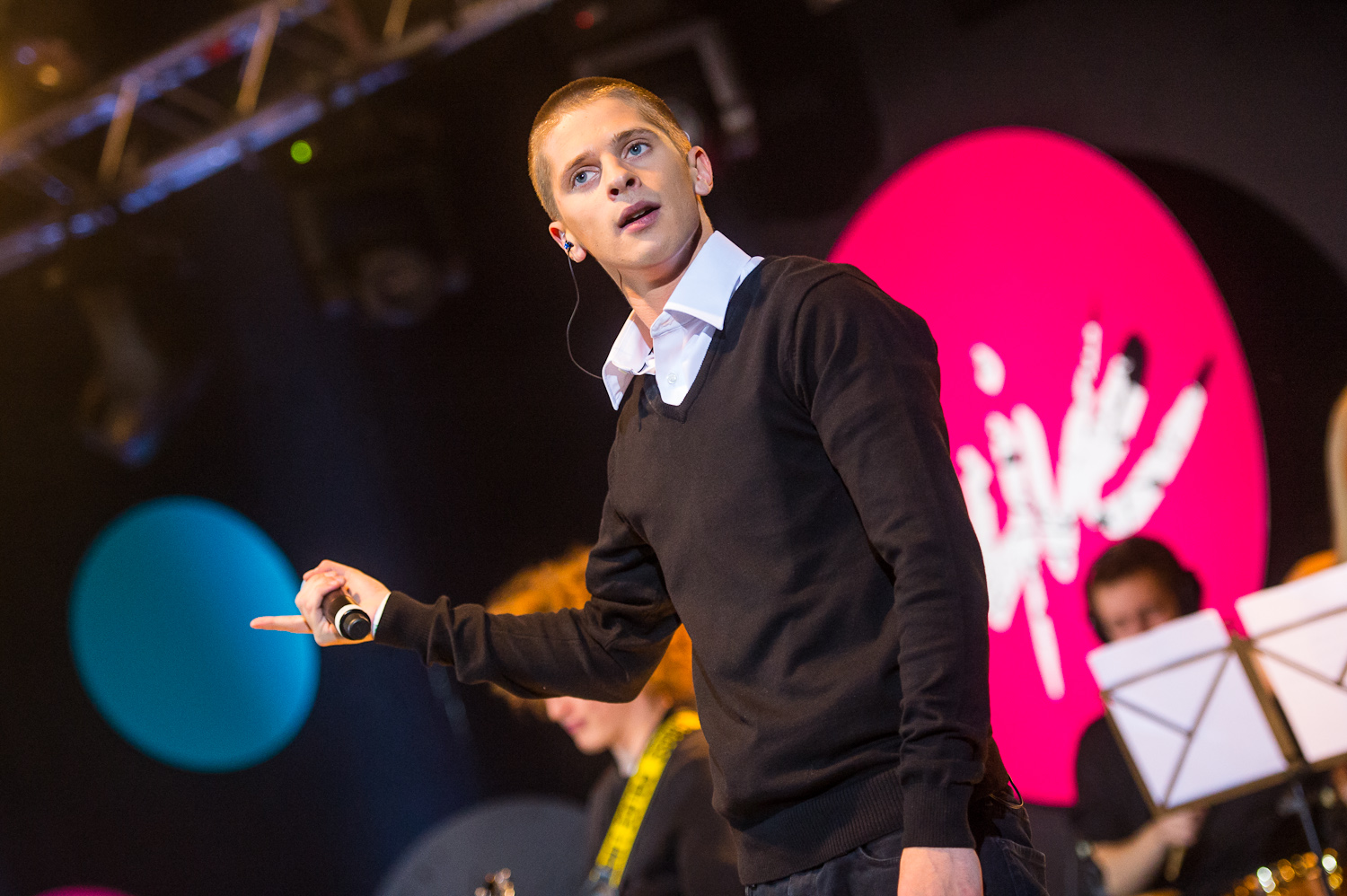 Kenneth Rüütli (Kenito)